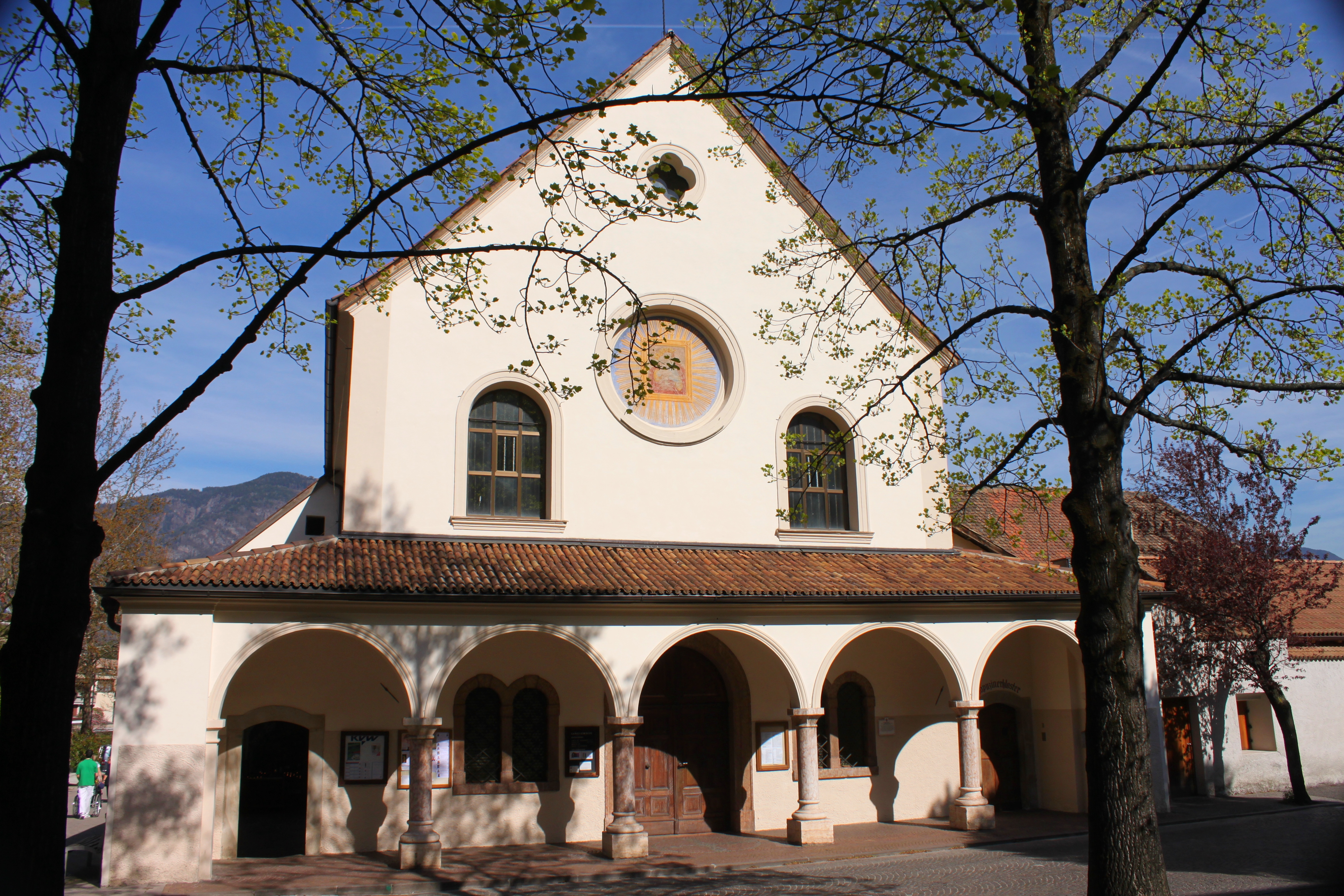 Die Kapuzinerkirche Hll. Anna und Joachim in der Kapuzinerstraße im Zentrum von Lana